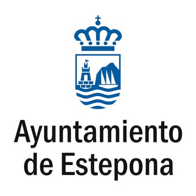 Escudo del Ayuntamiento de Estepona